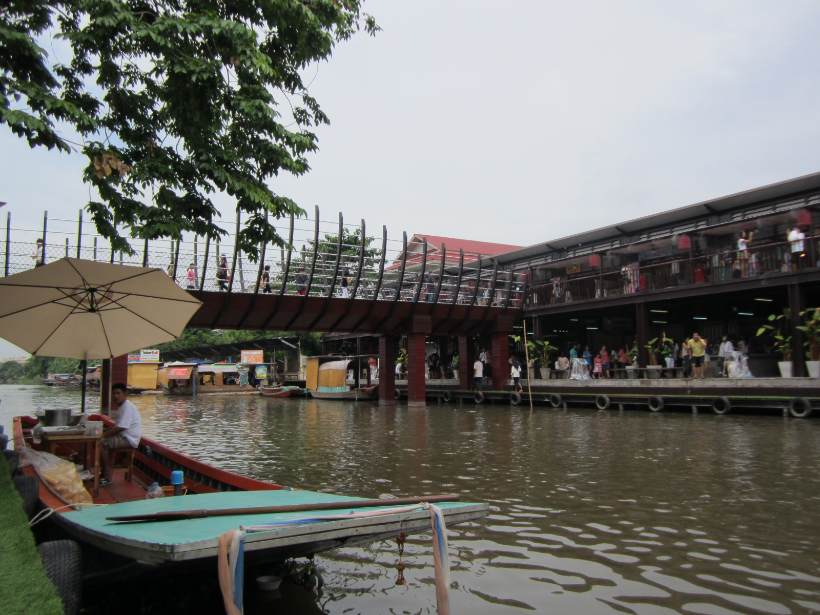 ตลาดน้ำขวัญเรียม วัดบำเพ็ญเหนิอ Wat Bumpennua Floating market